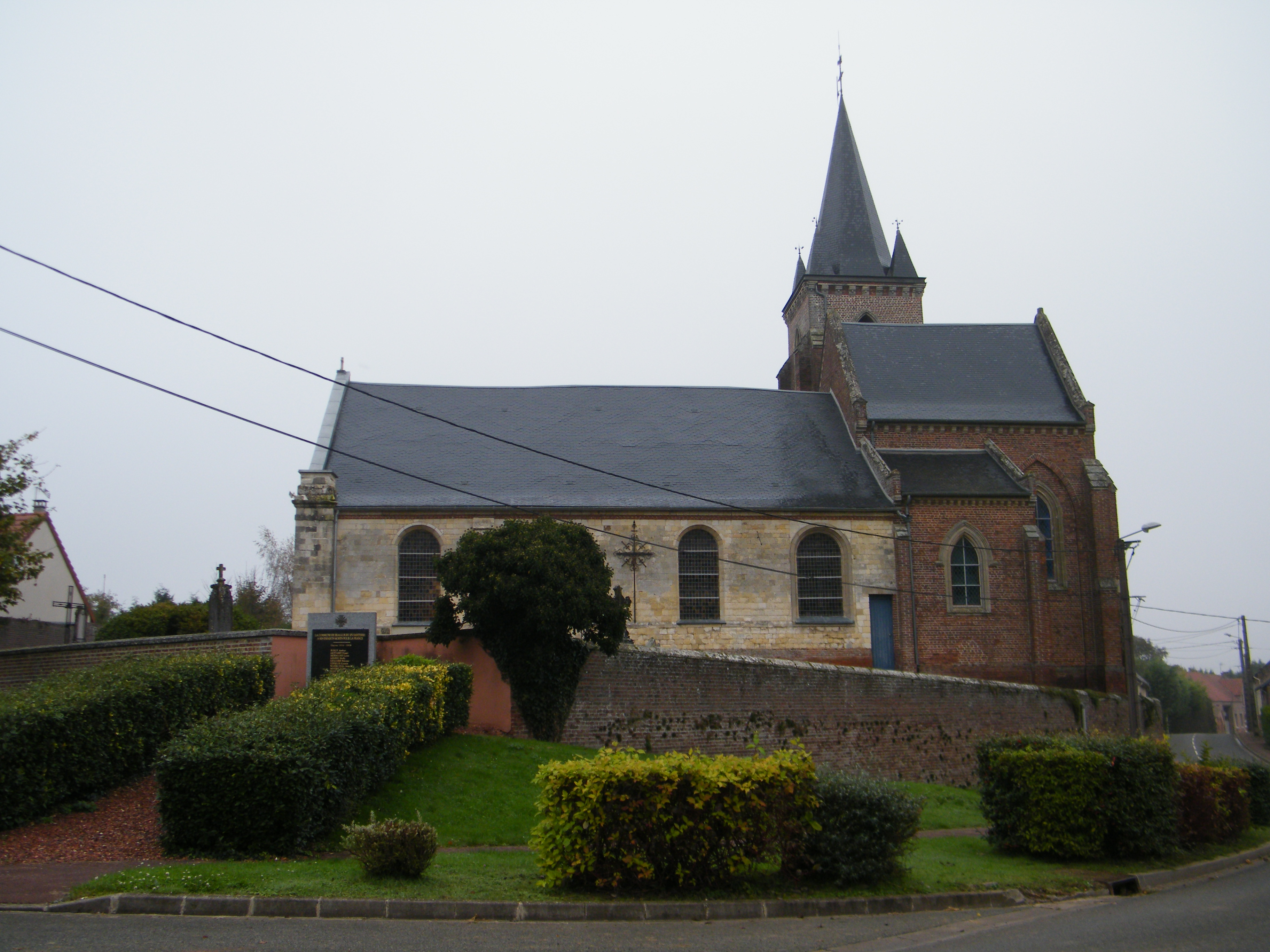 église.